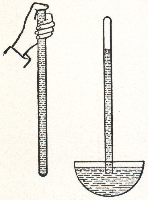 illustration de l'expérience de Torricelli sur la pression atmosphérique